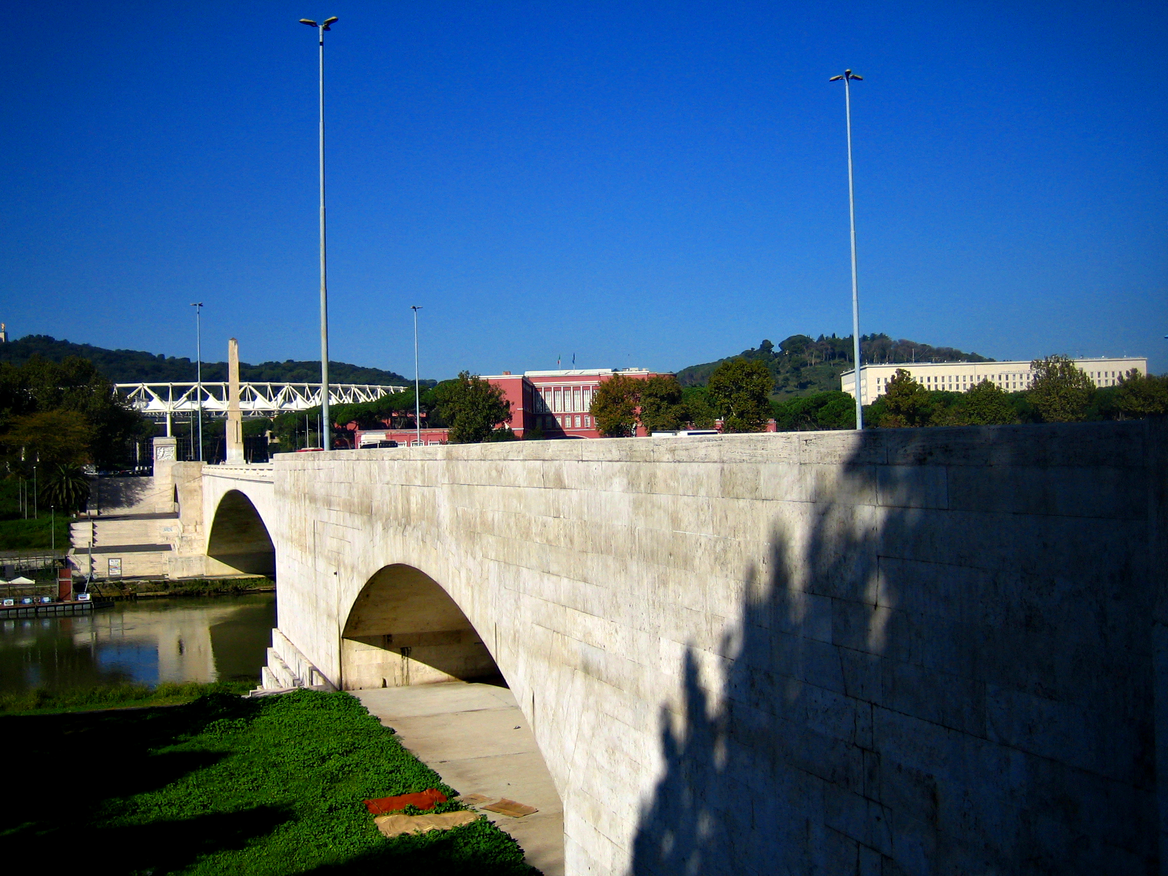 Foro Italico, Roma, Italia